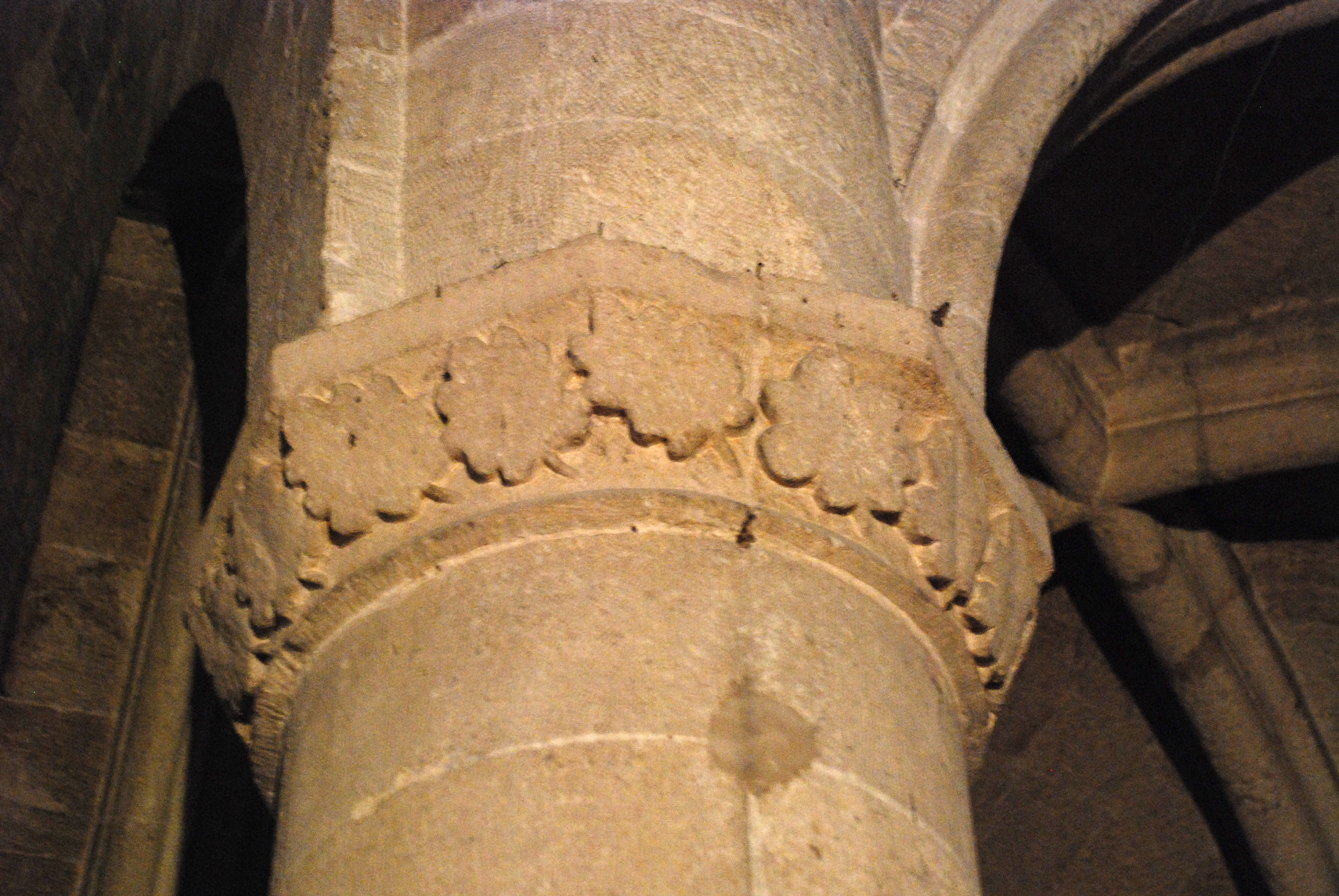 France - Alpes-de-Haute-Provence - Moustiers-Sainte-Marie - église Notre-Dame